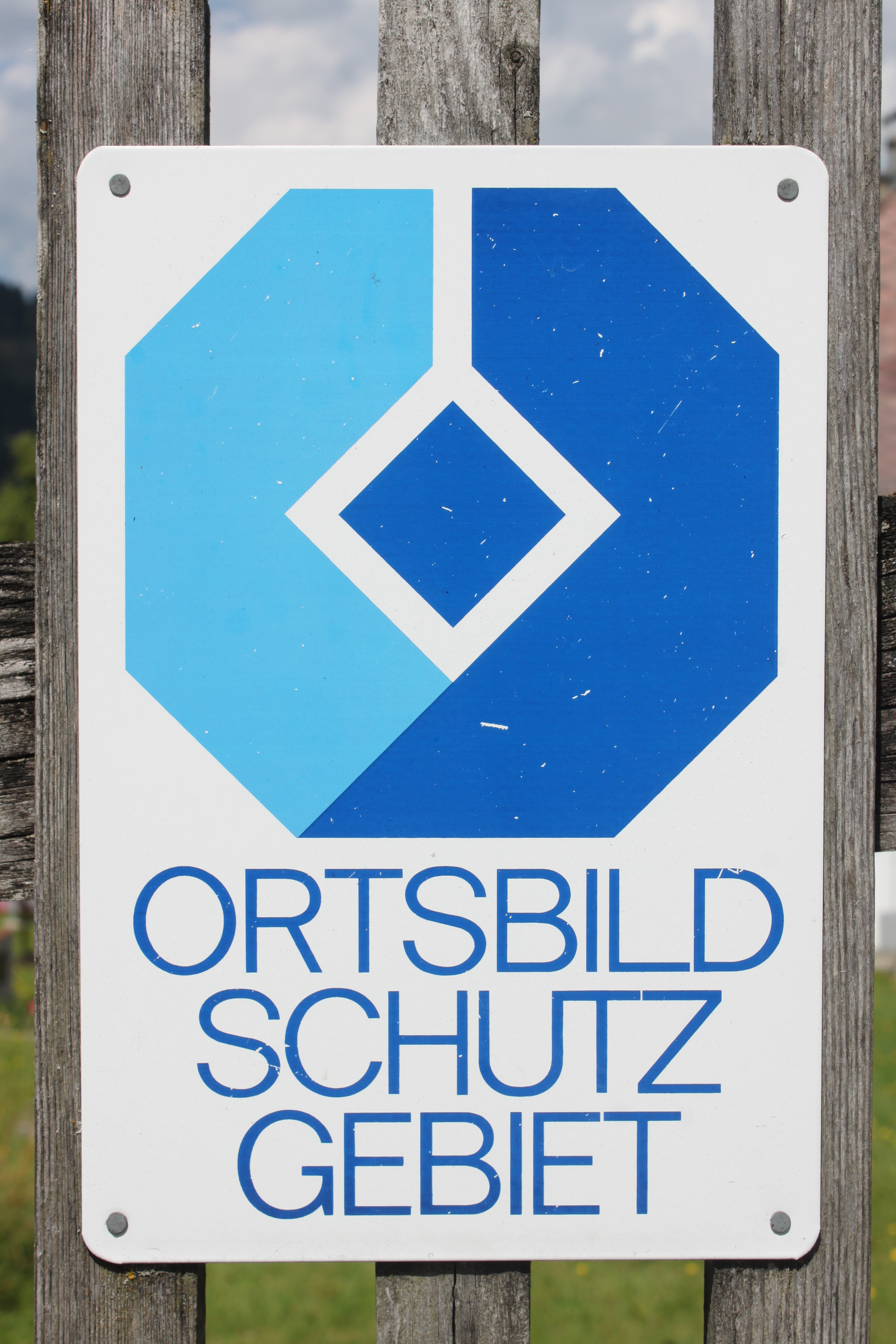 Friedhof und Kapelle in Mariazell, Hinweis Ortsbildschutzgebiet außen am Lattenzaun